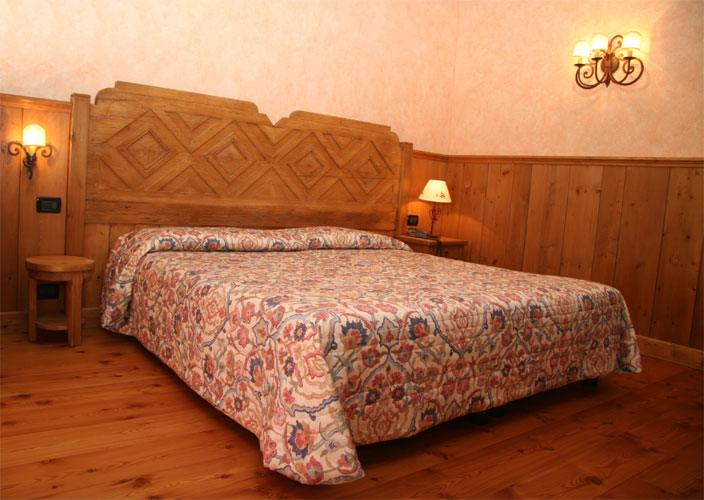 Camera in stile alpino di un albergo a Courmayeur, Valle d'Aosta, Italia.